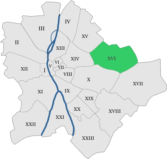 map hungary budapest district 16